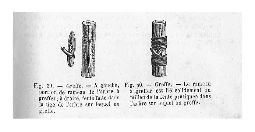 Greffe en écusson ; 2 dessins